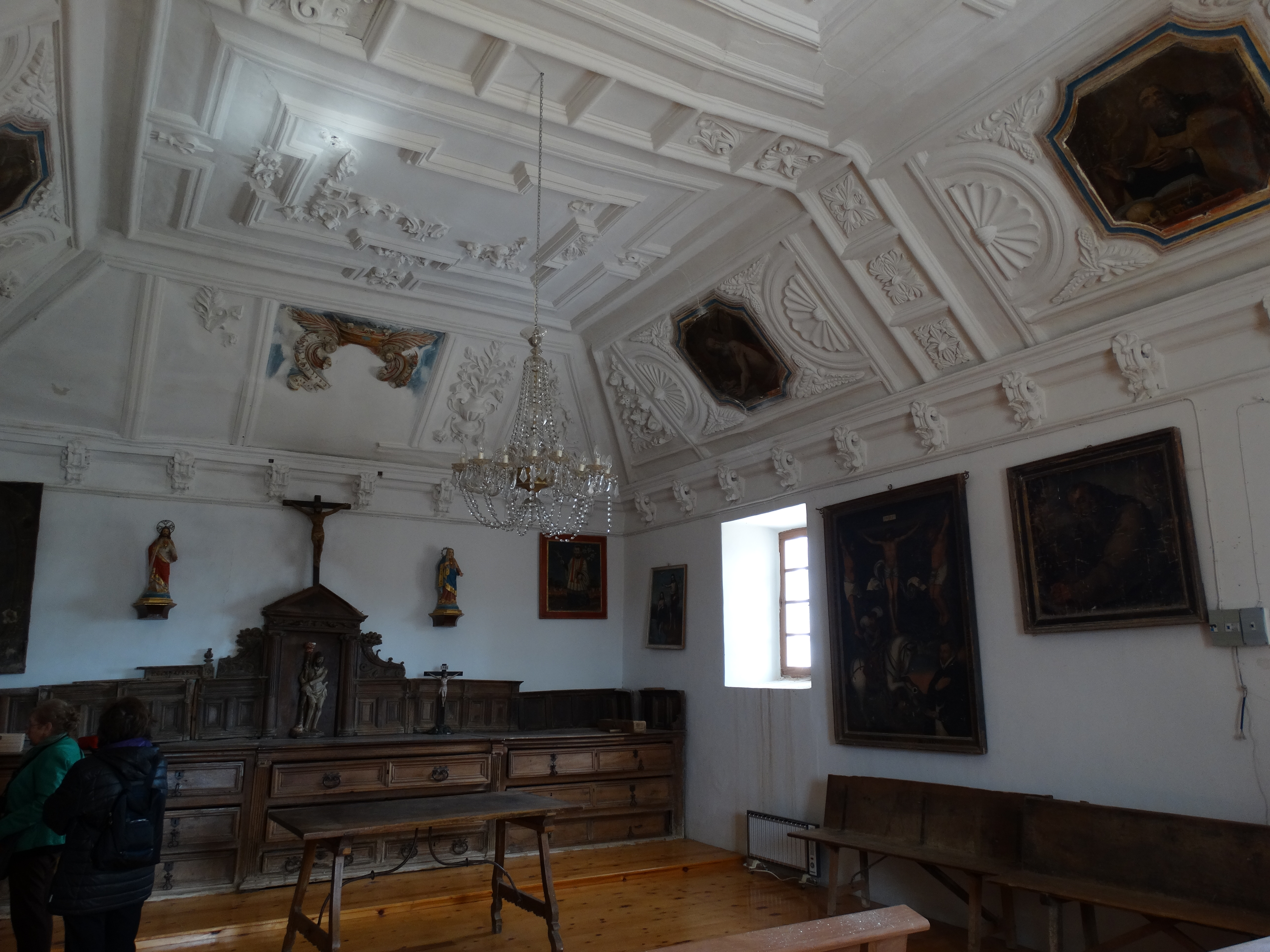 Torremormojón, provincia de Palencia, España. Iglesia de Santa María del Castillo. Sacristía.